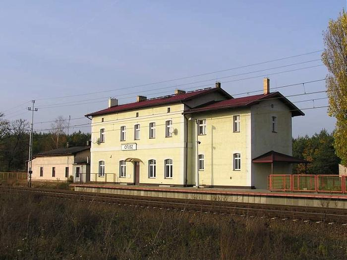 Otusz dworzec kolejowy